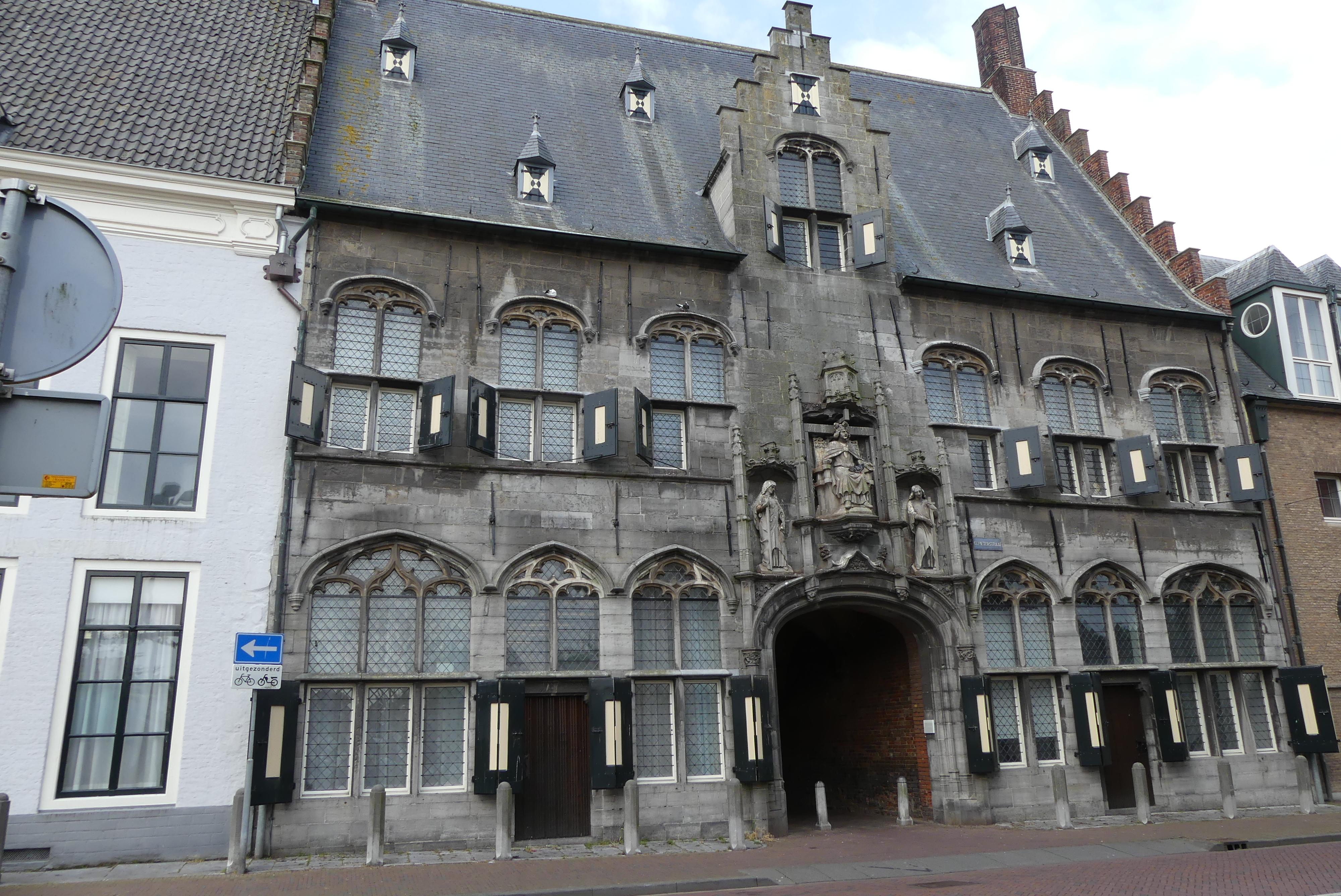 Gistpoort (Middelburg)